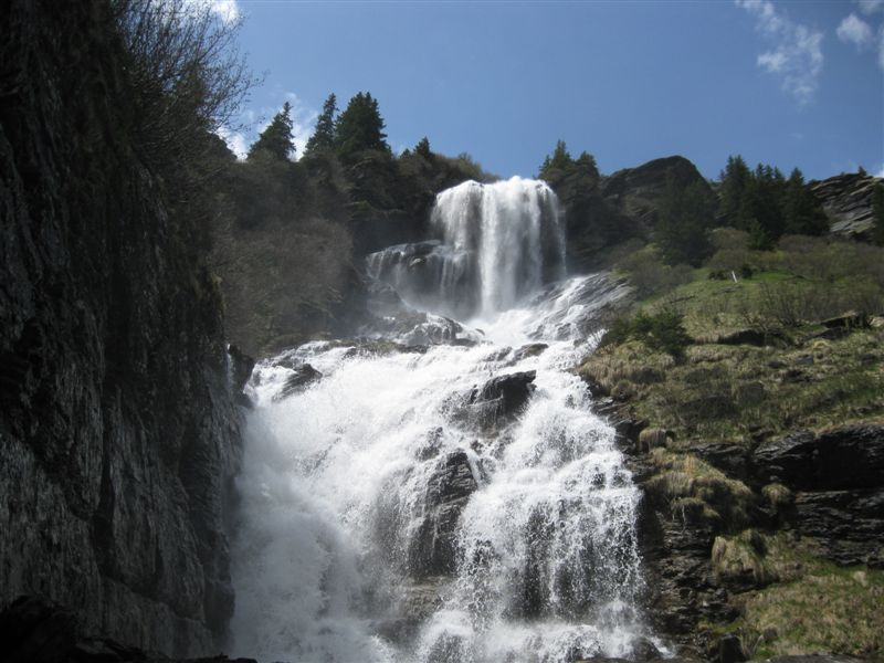 Bachlägerwasserfall